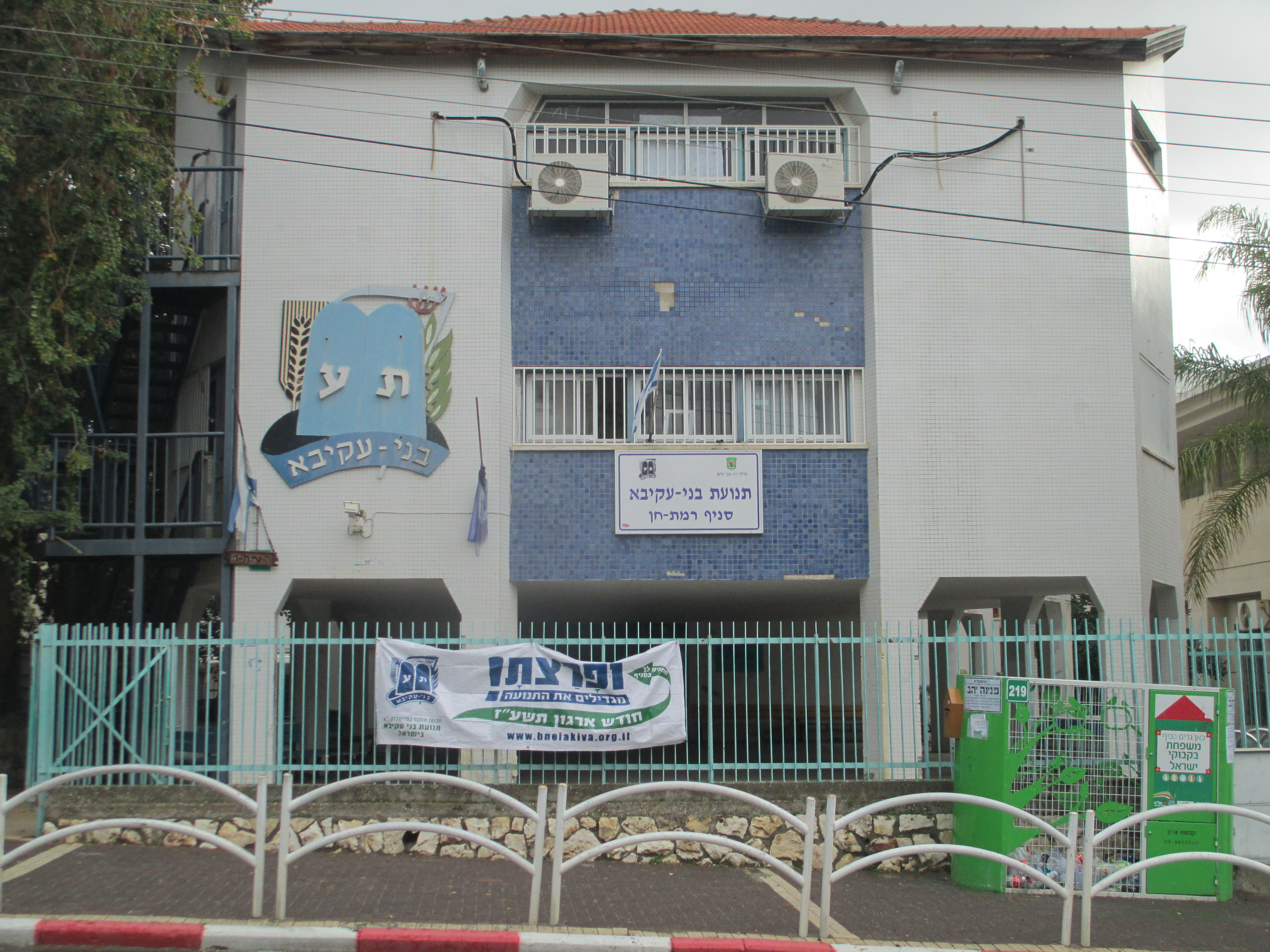 בית בני עקיבא סניף רמת חן ברמת גן, רח' הרא"ה